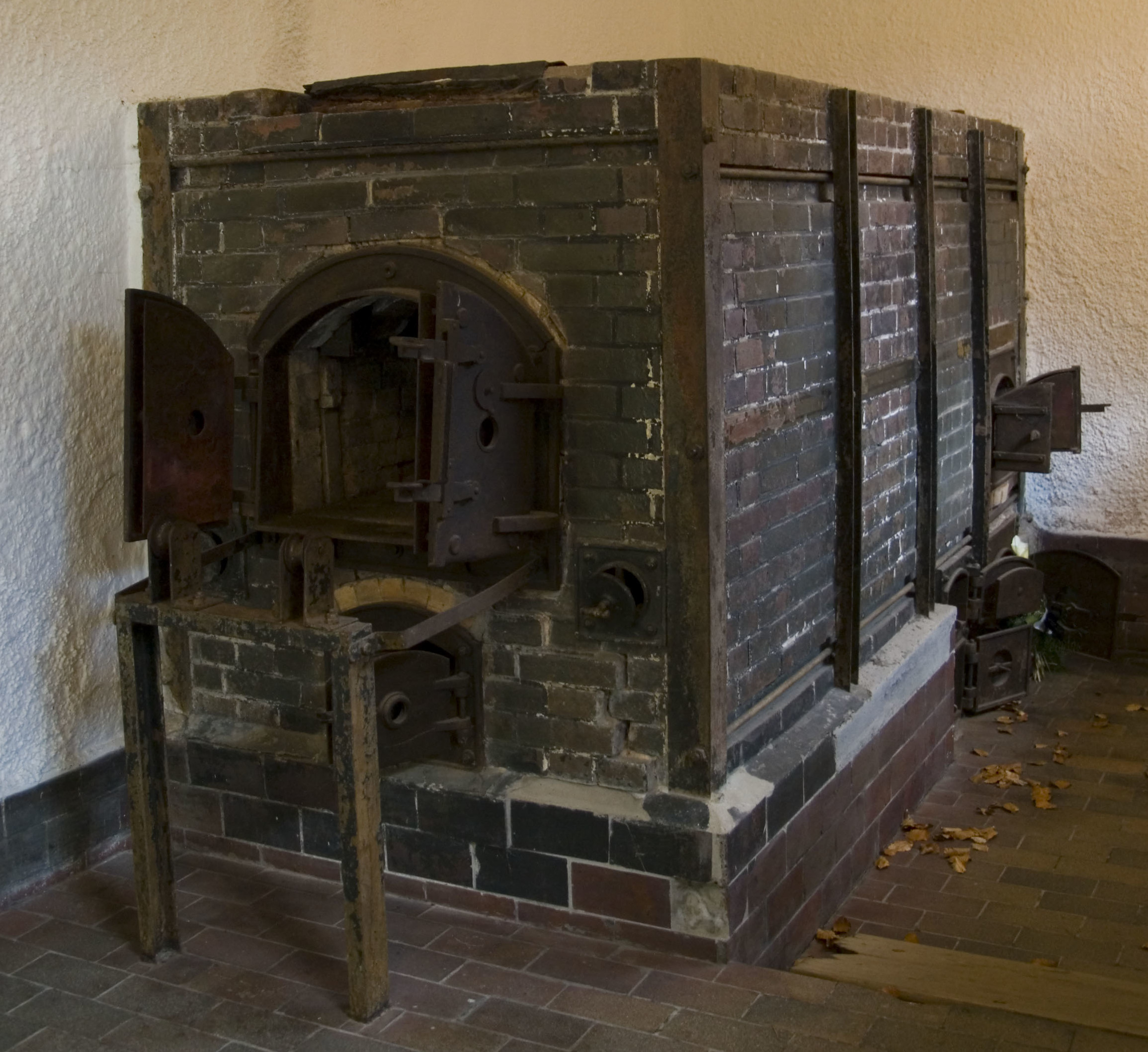 Verbrennungsofen im Krematorium, KZ Flossenbürg, Germany